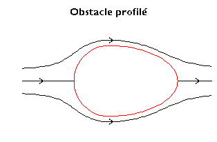 Obstacle profilé